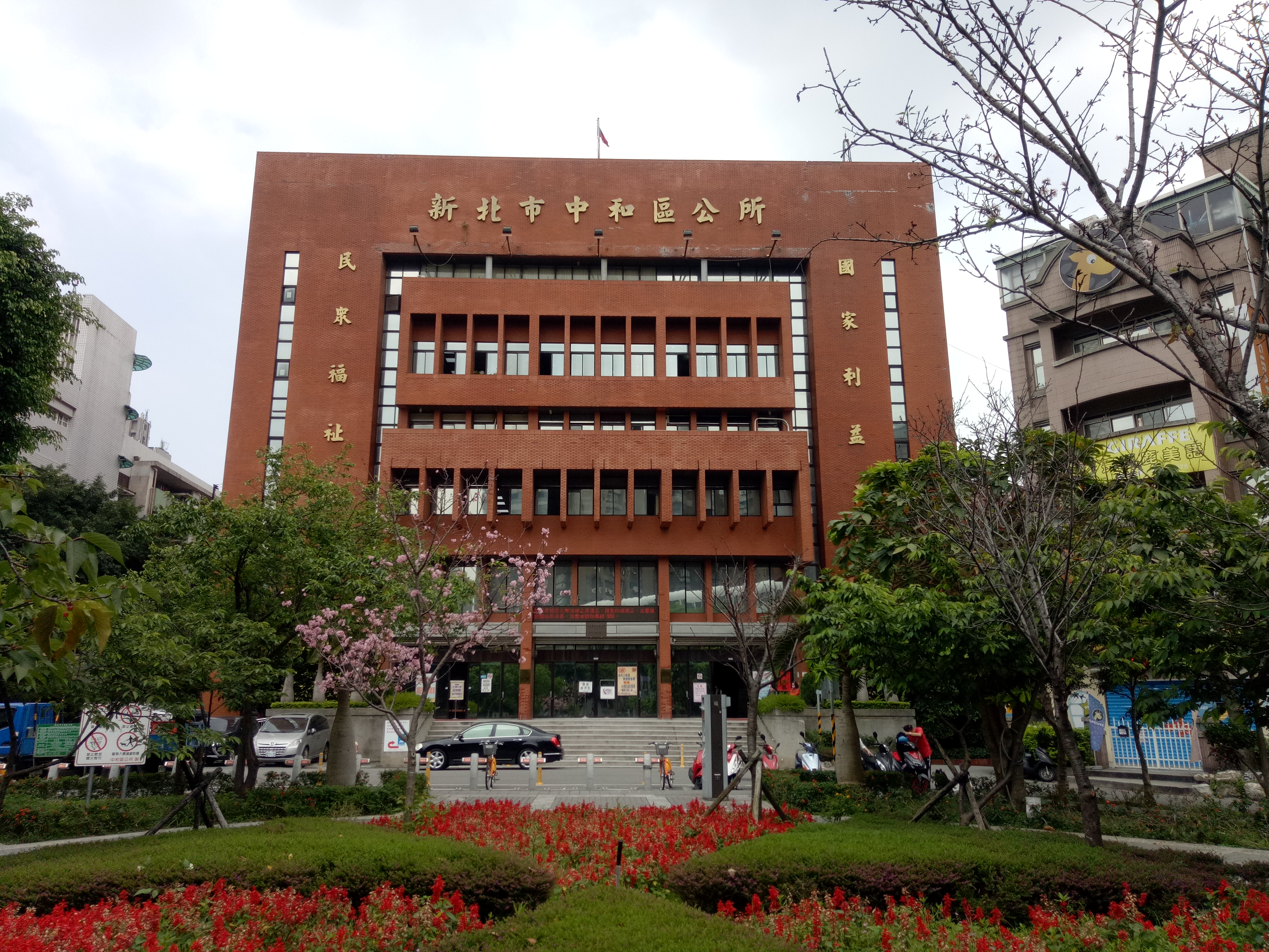 中文（台灣）: 新北市中和區公所，地址：新北市中和區景平路634之2號。